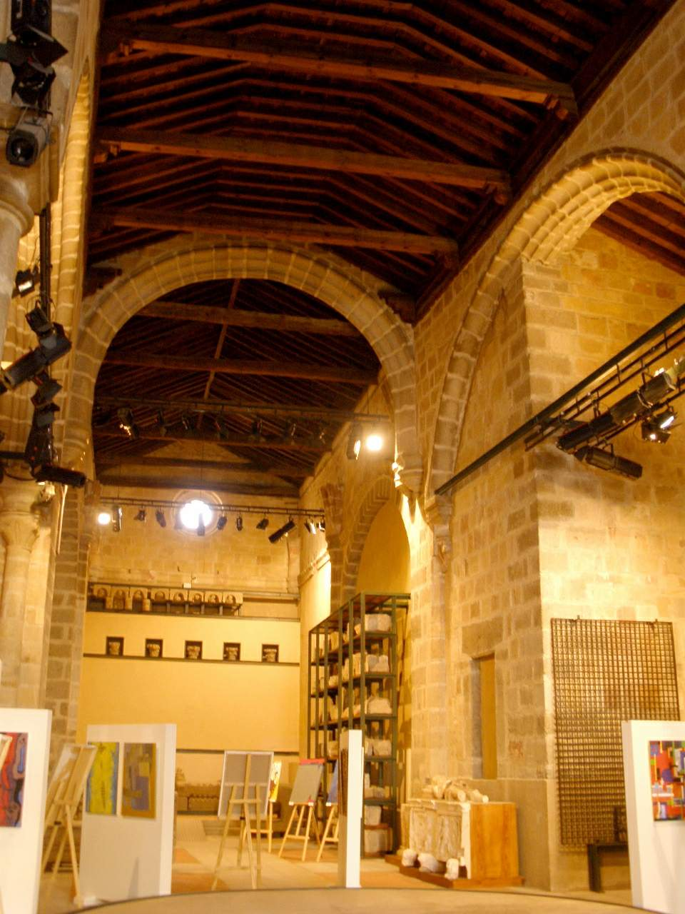 Avila - Museo de Avila, Iglesia de Santo Tome el Viejo